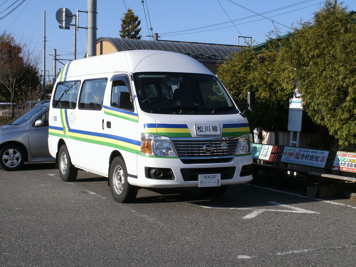 池田町営バス松川線 JR信濃松川駅前にて